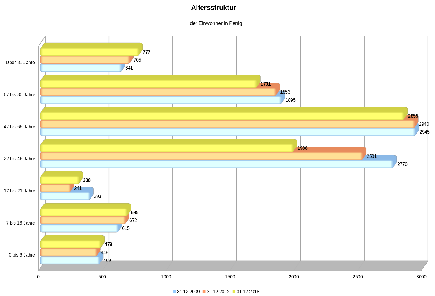 Altersstruktur der Einwohner von Penig, Stand 31.12.2018